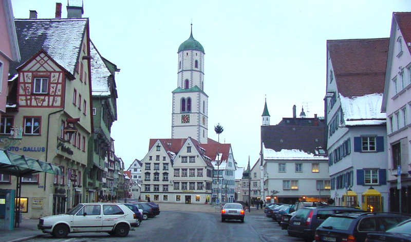 Blick auf den Marktplatz von Biberach/Riß Mit Genehmigung von Weberberg.de, Website für Biberach veröffentlicht.